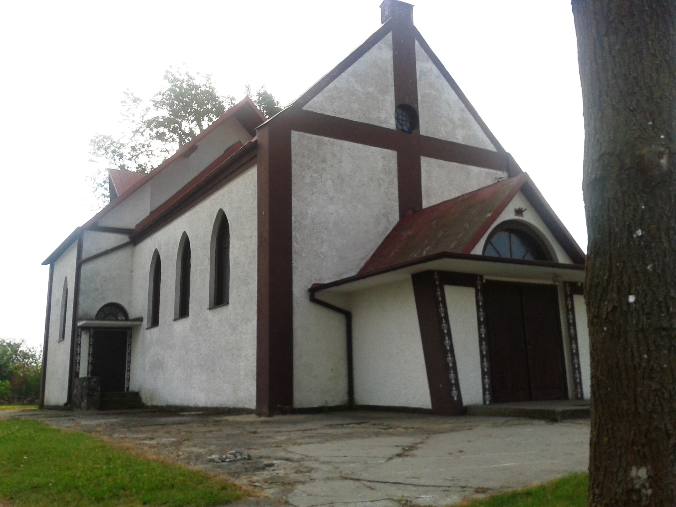 Brzeżno - rzymskokatolicki kościół parafialny p.w. Wniebowstąpienia Pańskiego